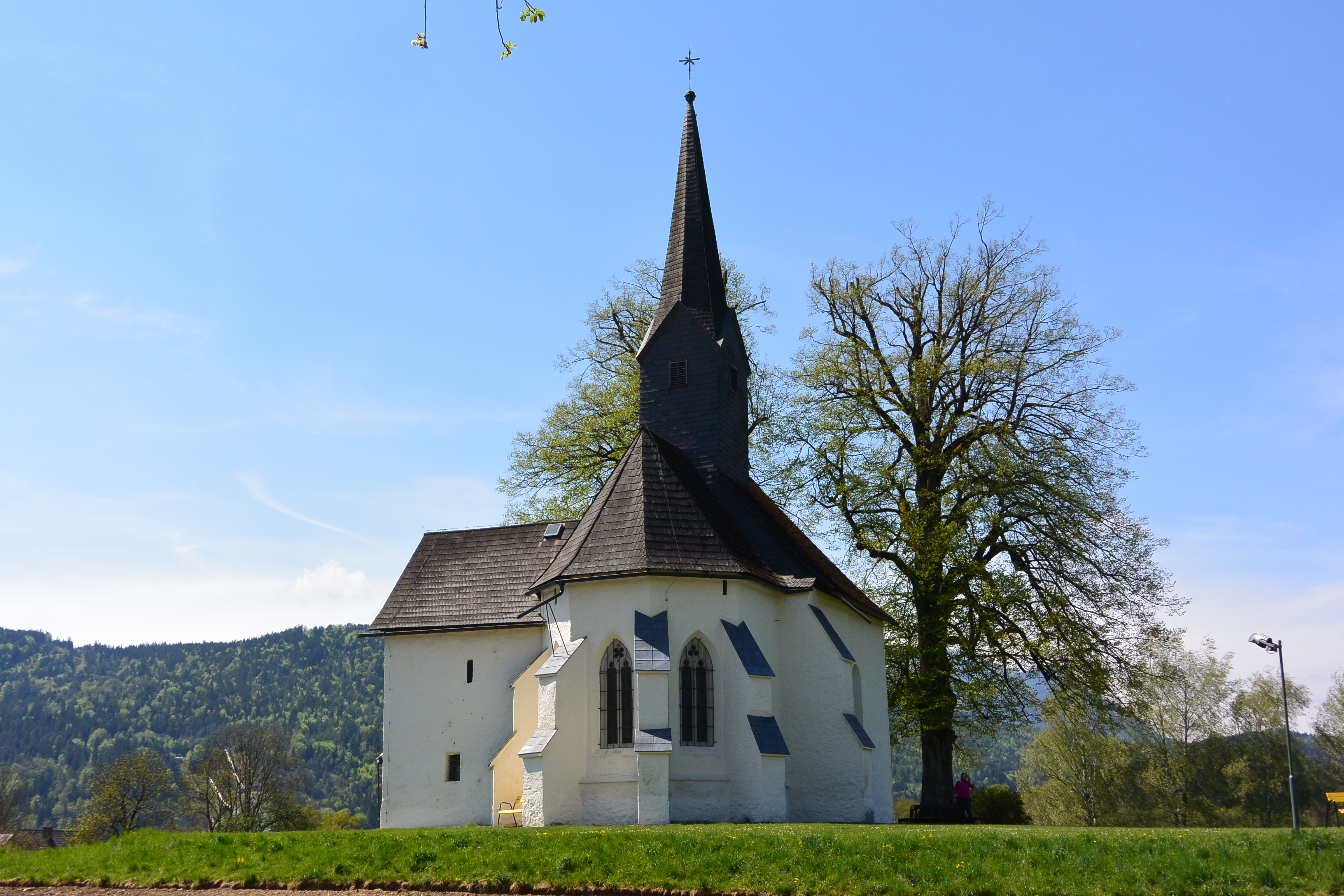 Filialkirche Sankt Johann, Villach